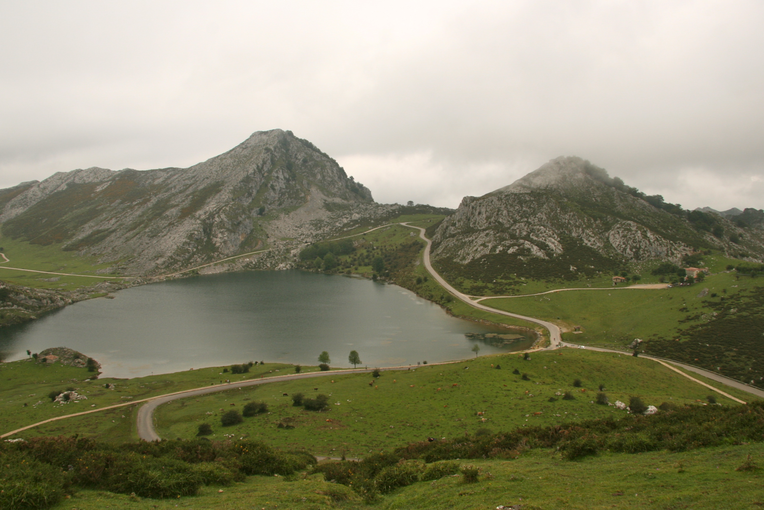 Porque el silencio es tan infinito tan espantoso y grande como un grito que cae degollado desde lo alto.